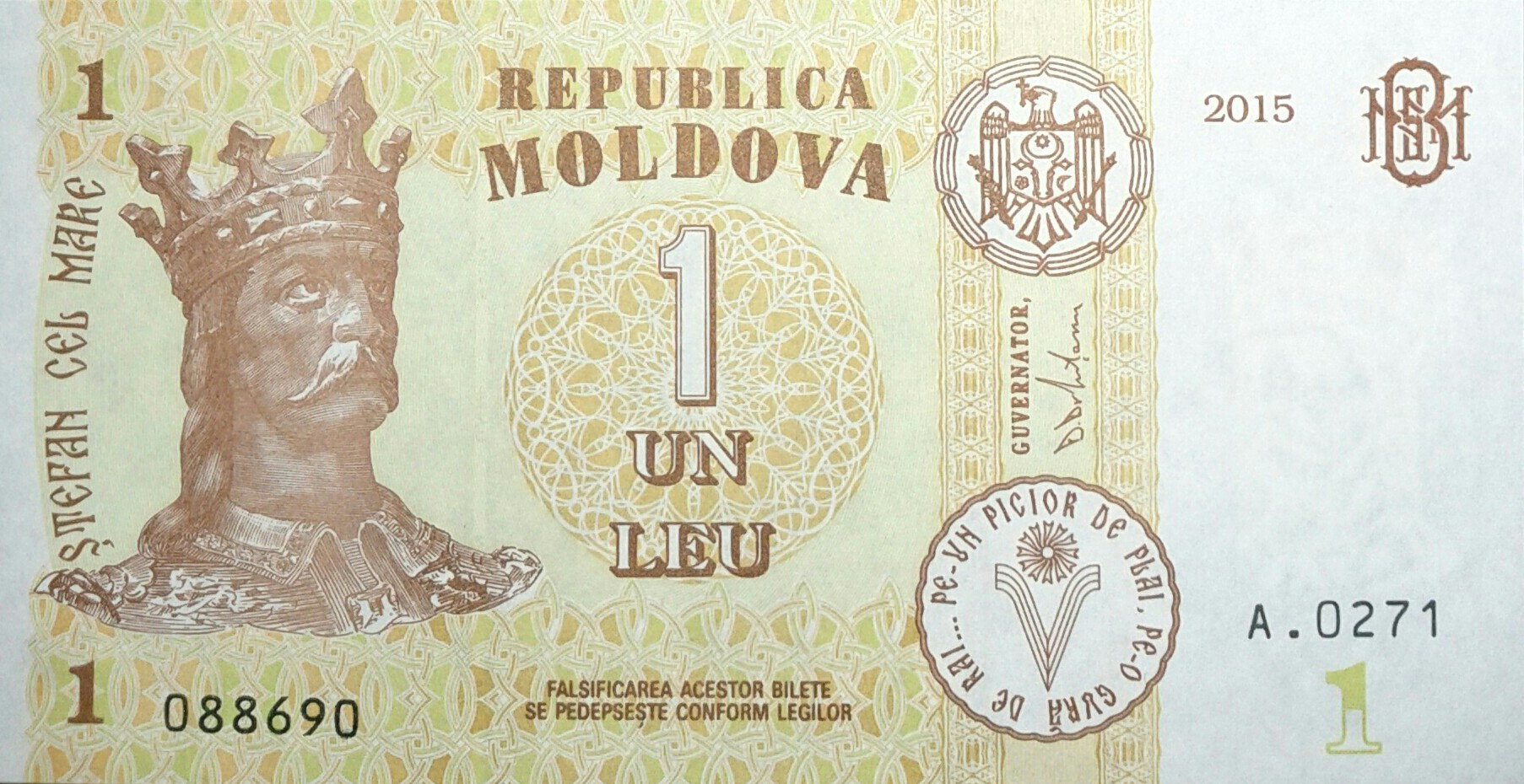 1 leu 2015